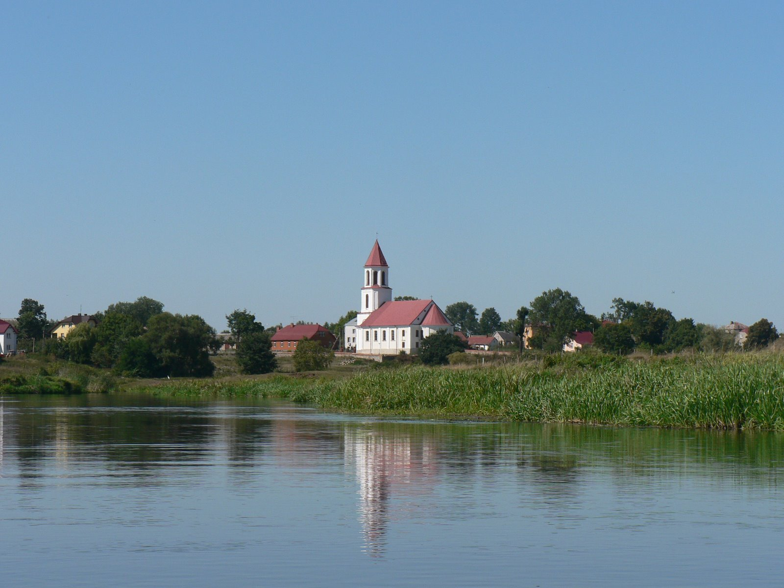 Narew w Surażu, kościół pw. Bożego Ciała